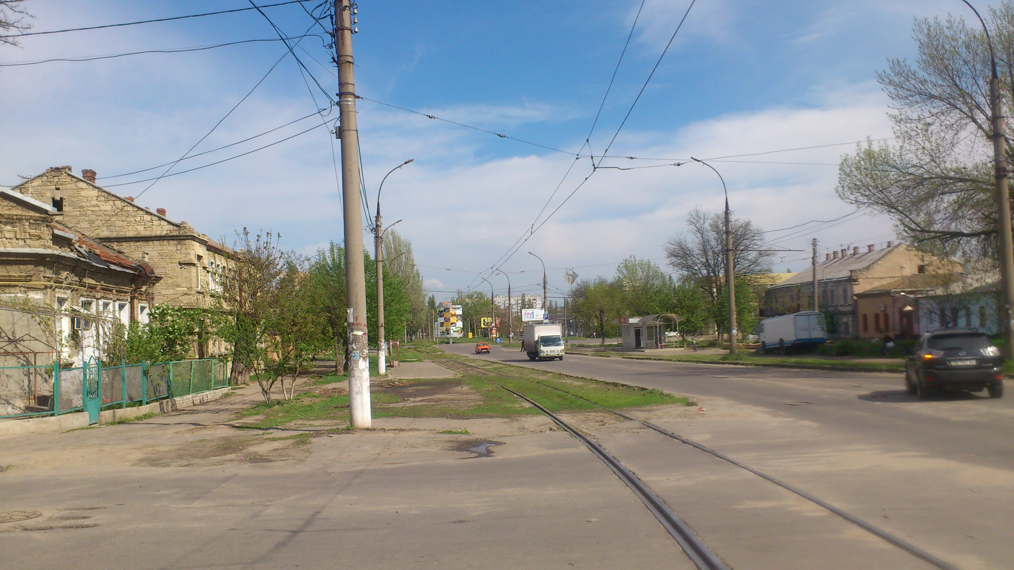 Миколаїв, вулиця Чкалова на розі з Малою морською